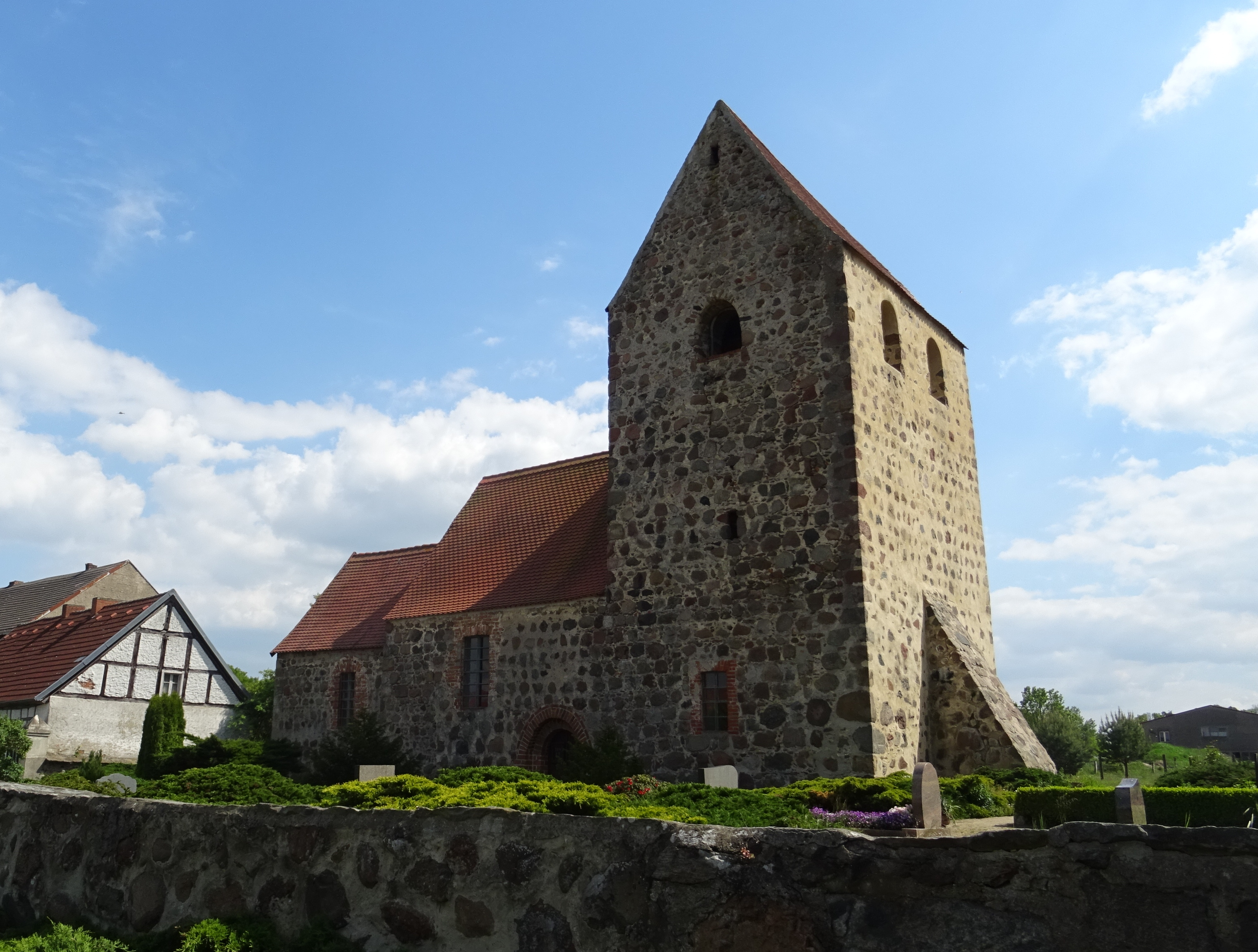 Arensberg, Ortsteil der Stadt Bismark (Altmark), denkmalgeschützte Kirche